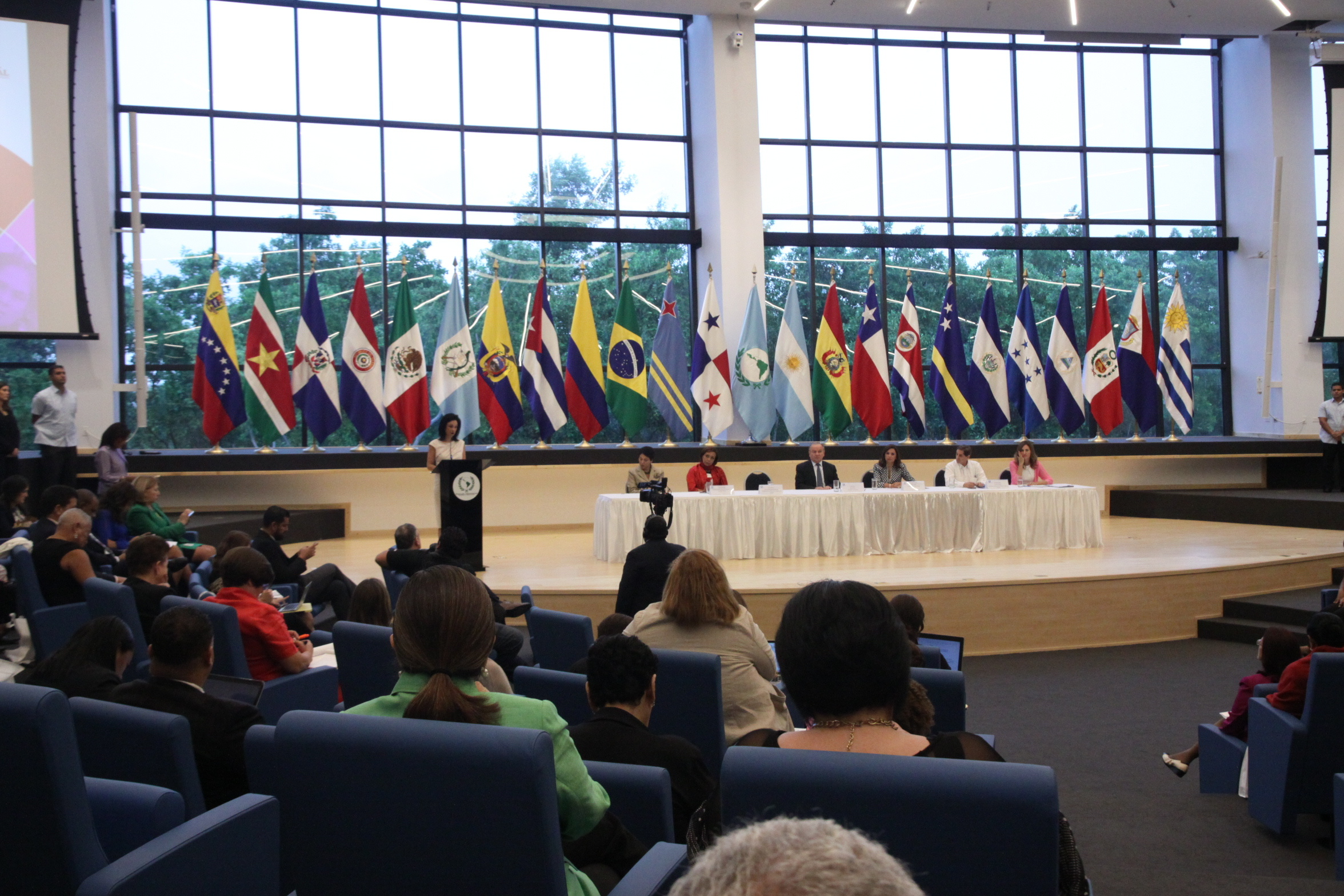 Fotografía: Hugo Ortiz / Asamblea Nacional Tema: Conmemoración de los 50 años del Parlamento Latinoamericano